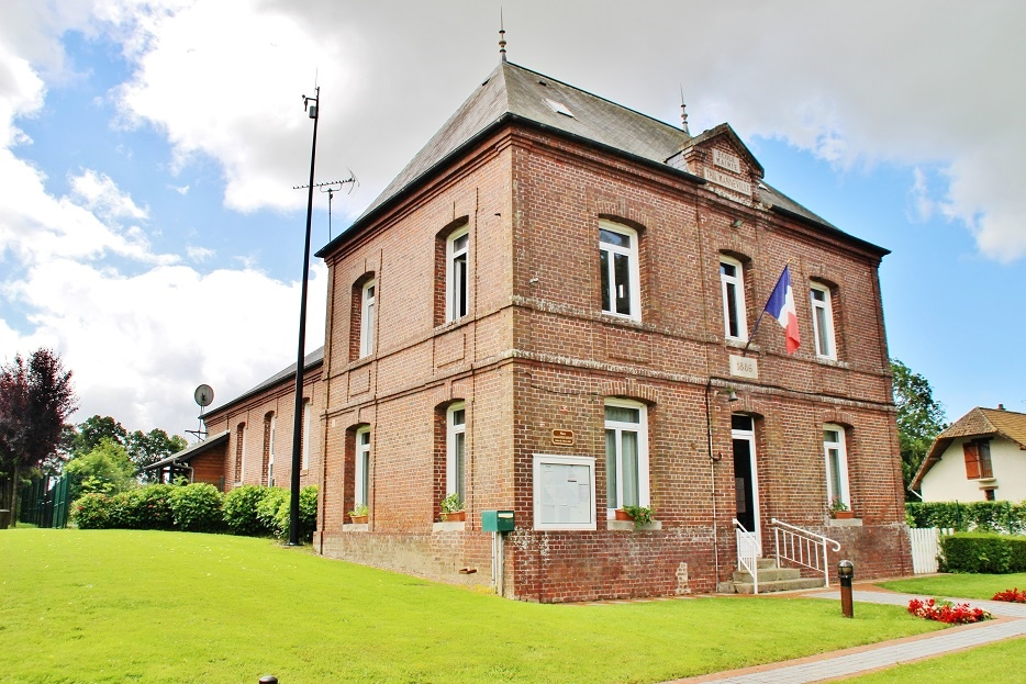 La Mairie